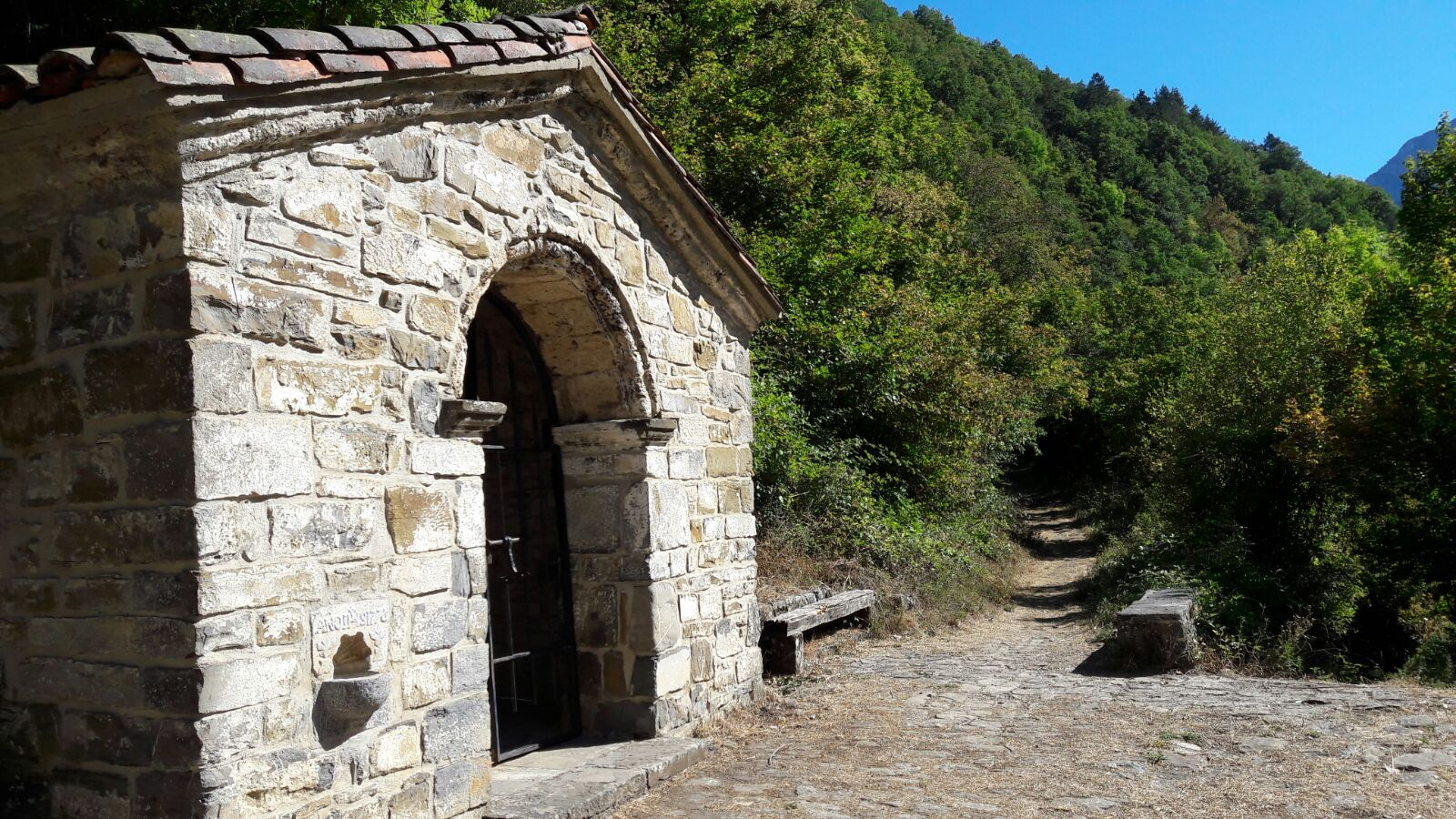 ermita belen, isabaEuskara: Belengo baseliza, Izaba, Erronkaribar, Nafarroa